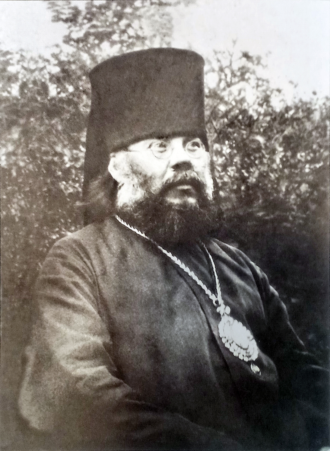 Епископ Филарет (Раменский)